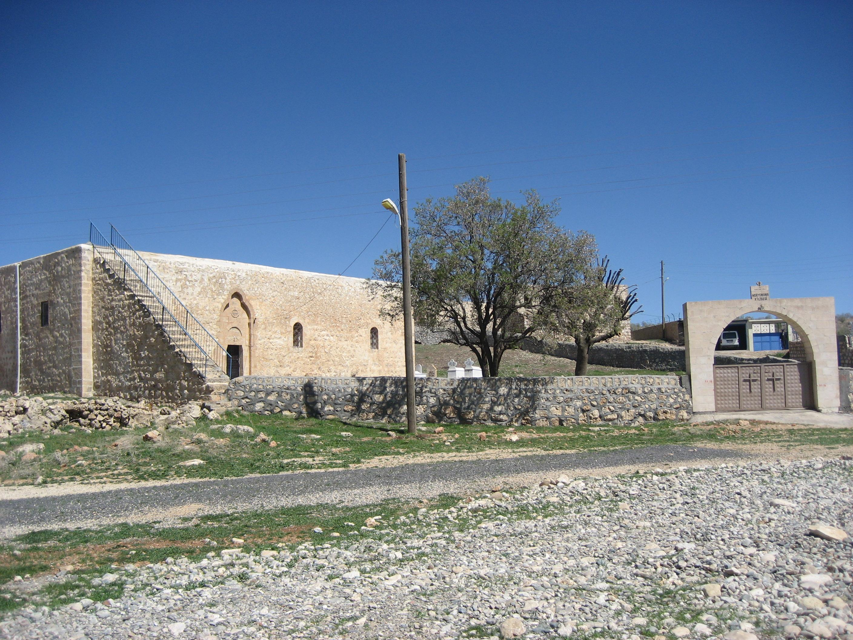 St.-Maria-Kirche im Sederi